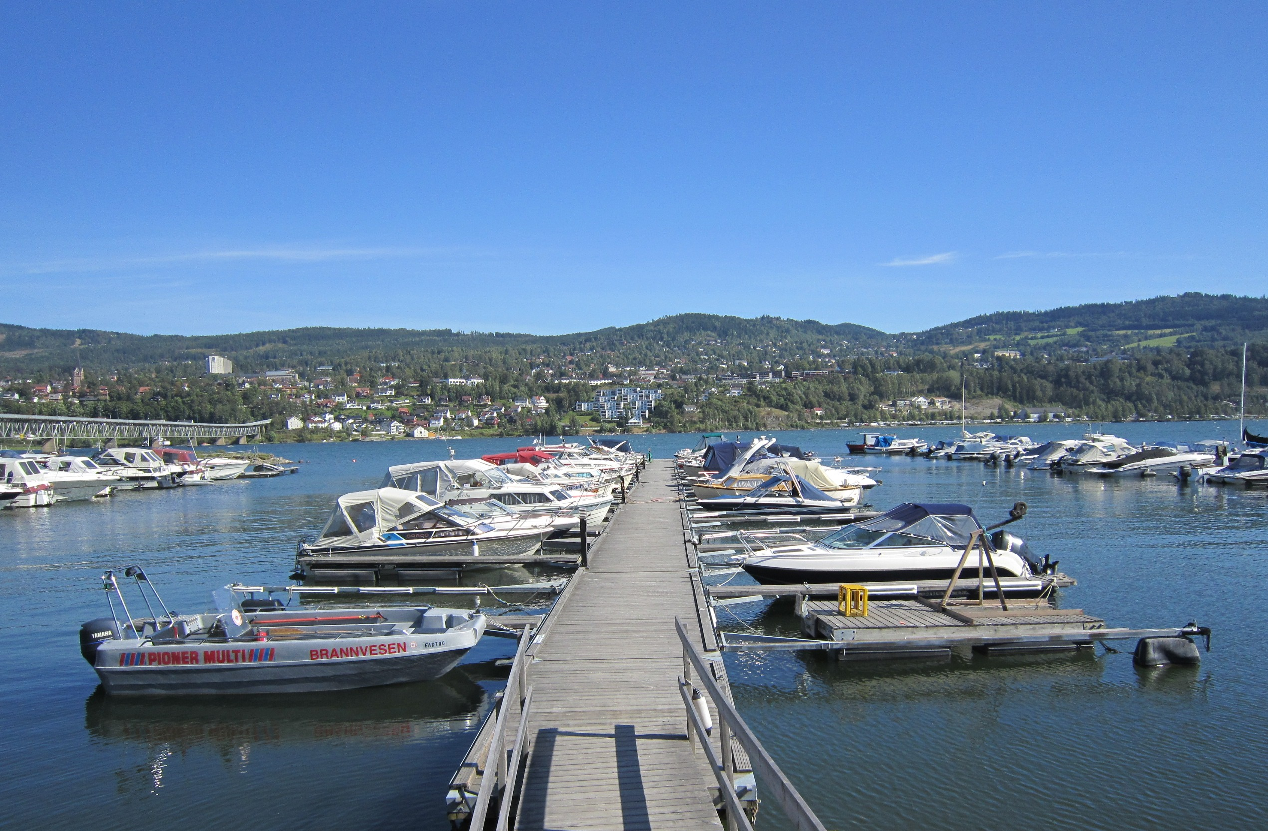 Vingnes båthavn